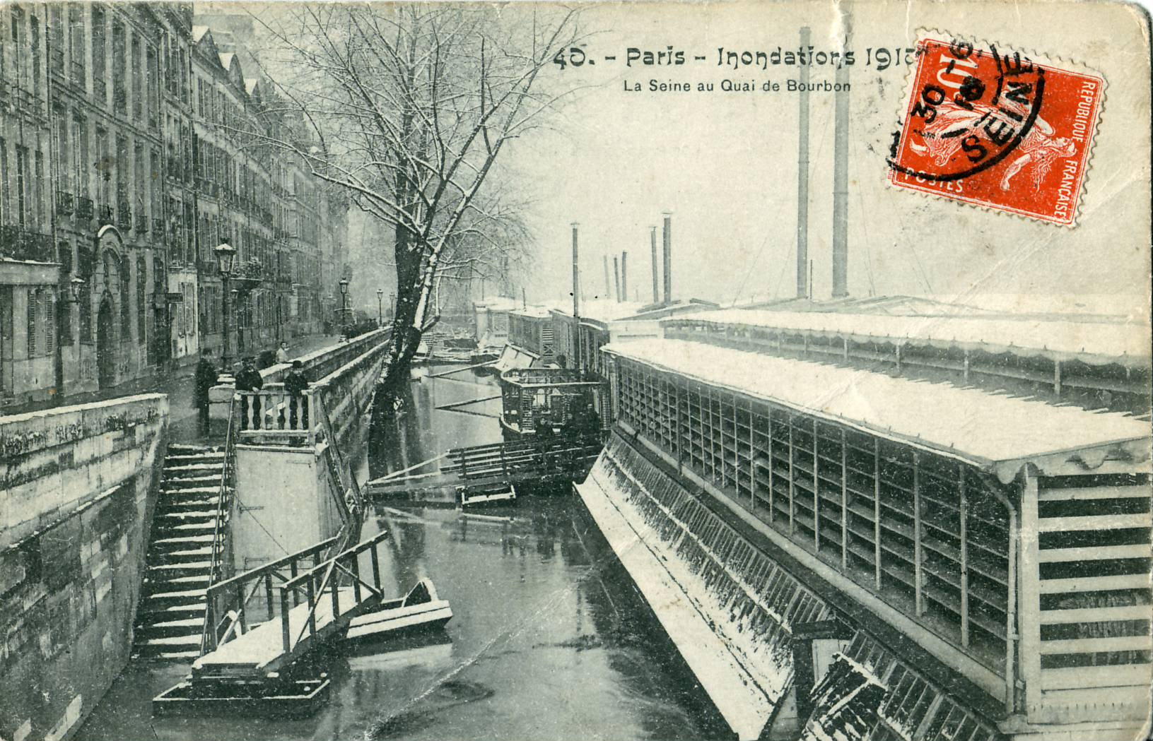 Carte postale ancienne, sans nom d'éditeur, N°40Paris : inondations de 1910 - La seine au Quai BourbonVue en gros plan d'un bateau-lavoir